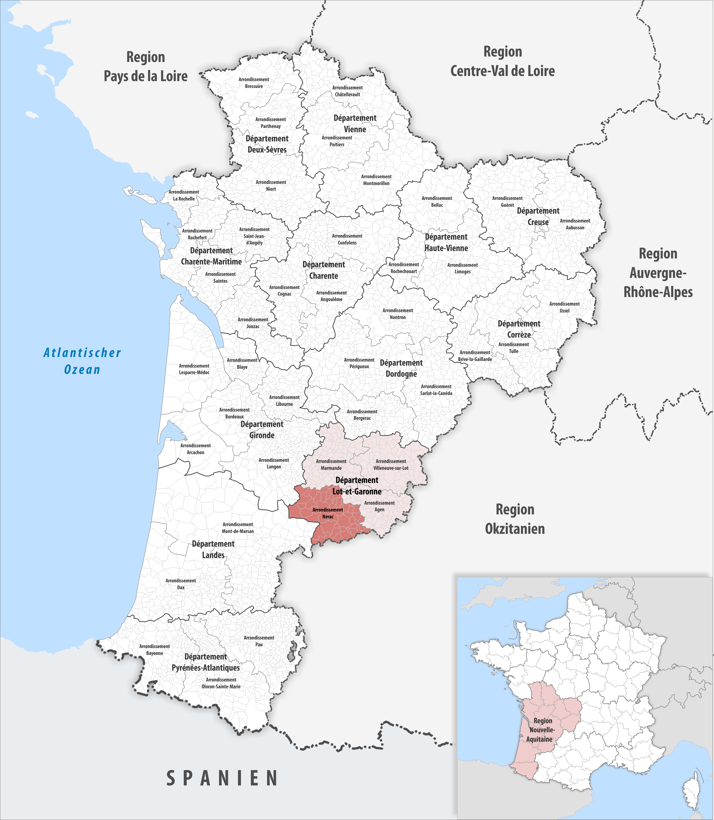 Lage des Arrondissements Nérac